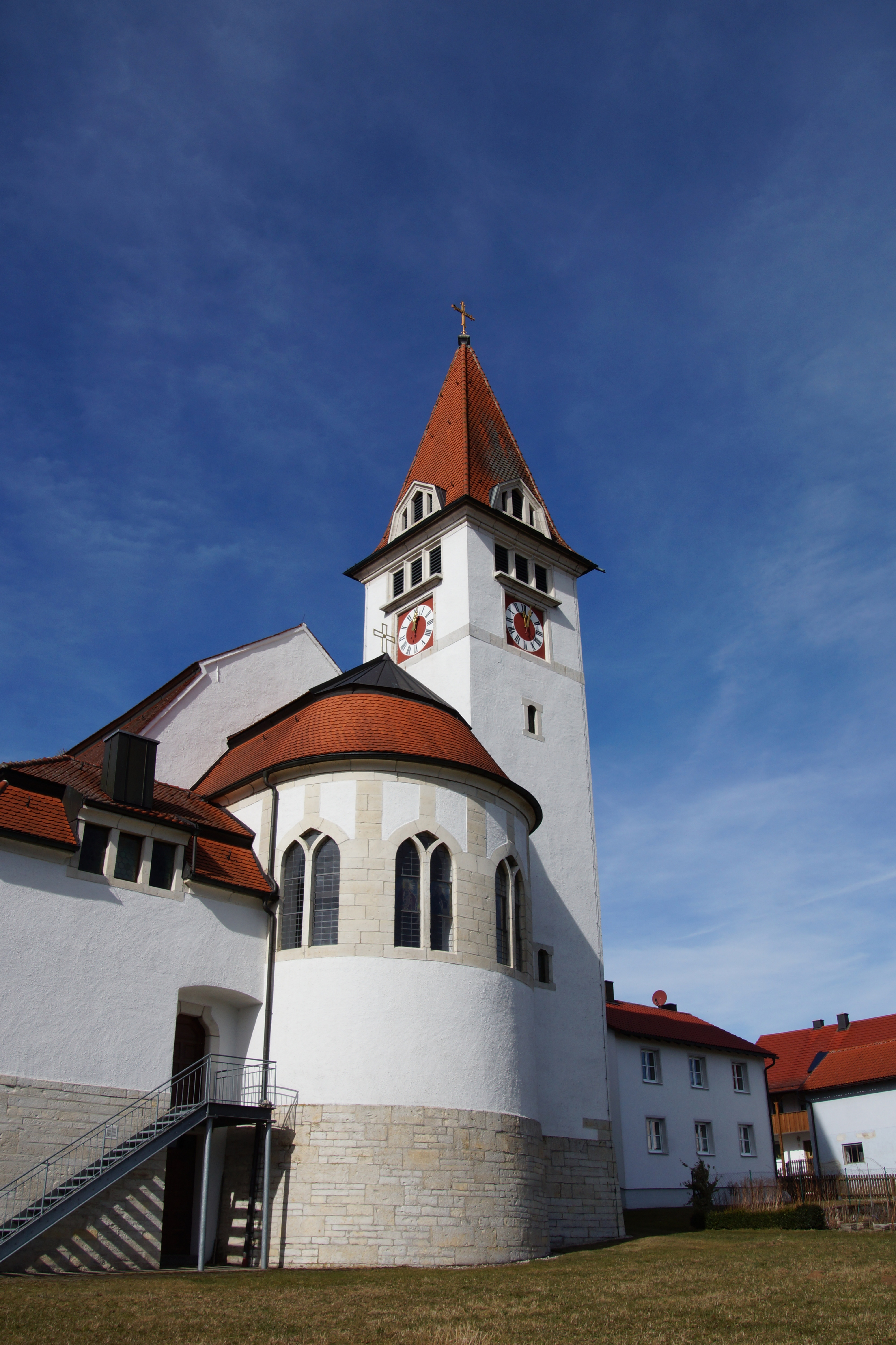 Die Pfarrkirche St. Nikolaus in Pfraunfeld